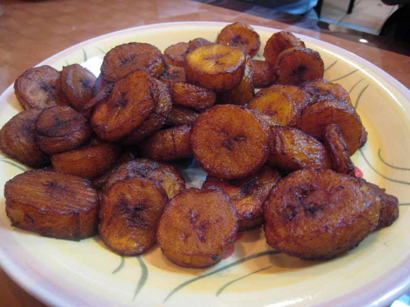 mariam aloko